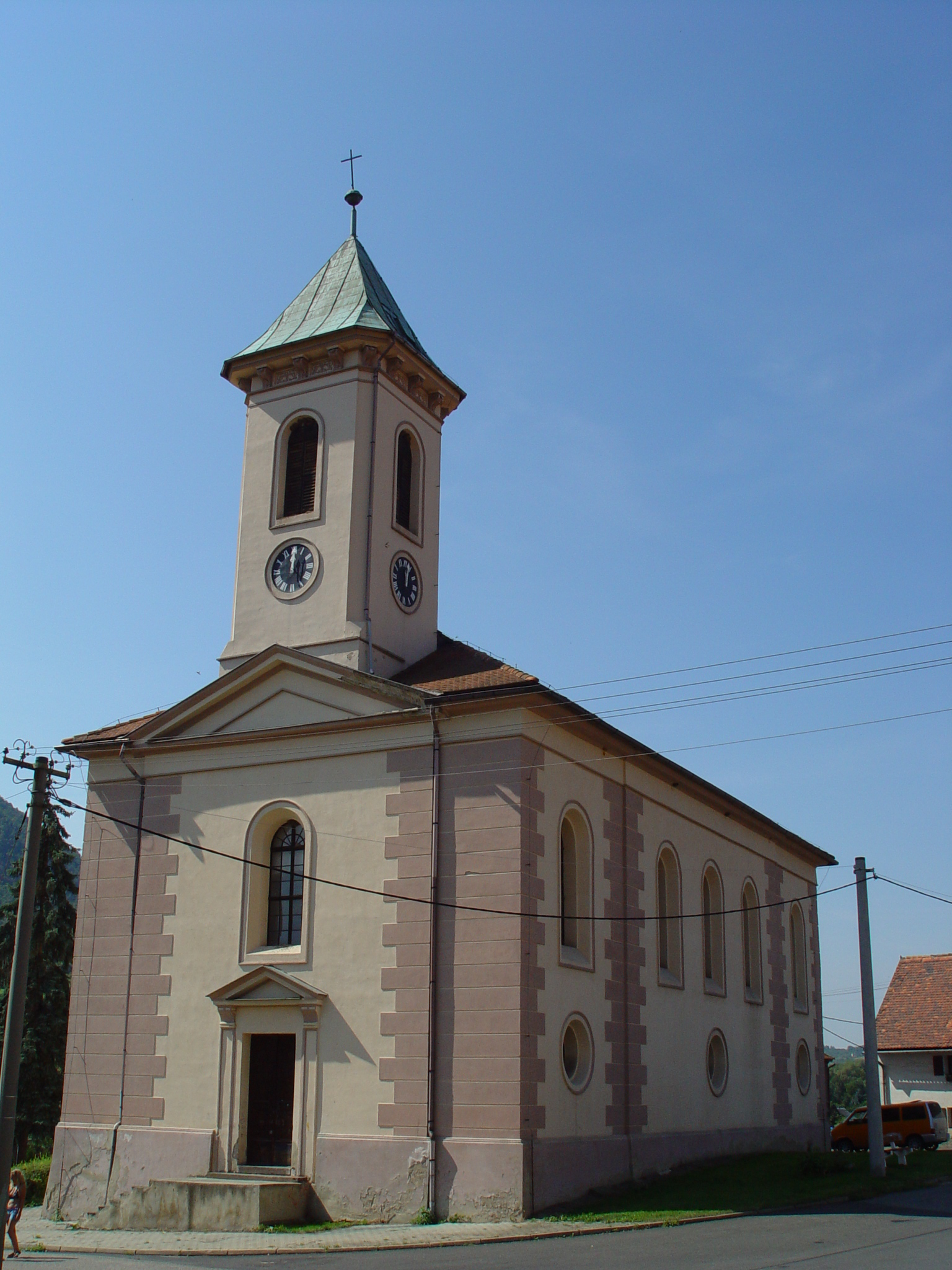 Kostel sv. Václava v Želenicích u Mostu